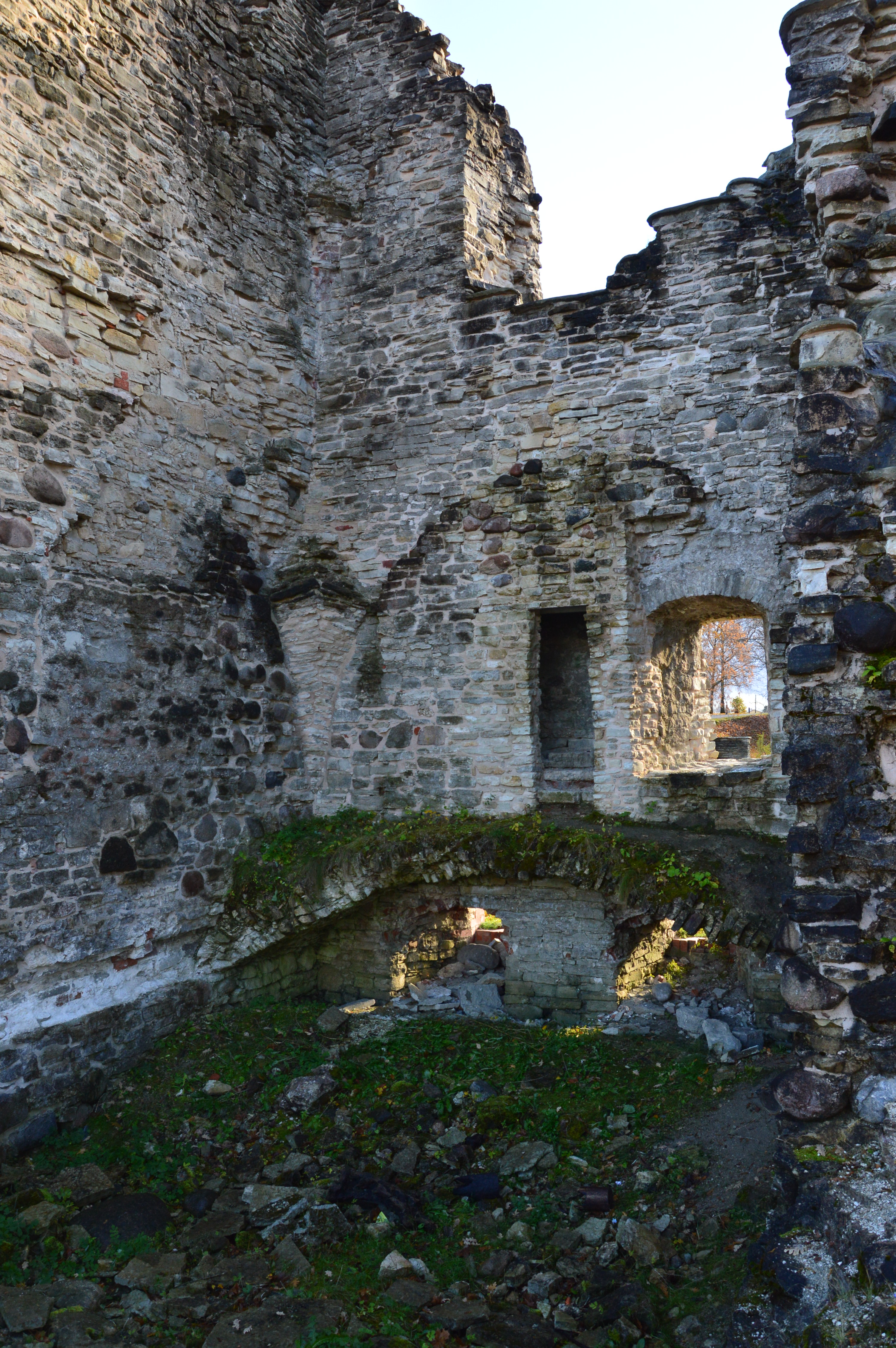 Paide ordulinnuse varemed Vallimäe kirdenurgas